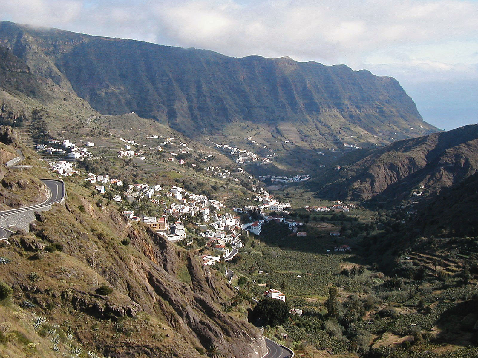 Hermigua im Nordosten der Insel La Gomera.